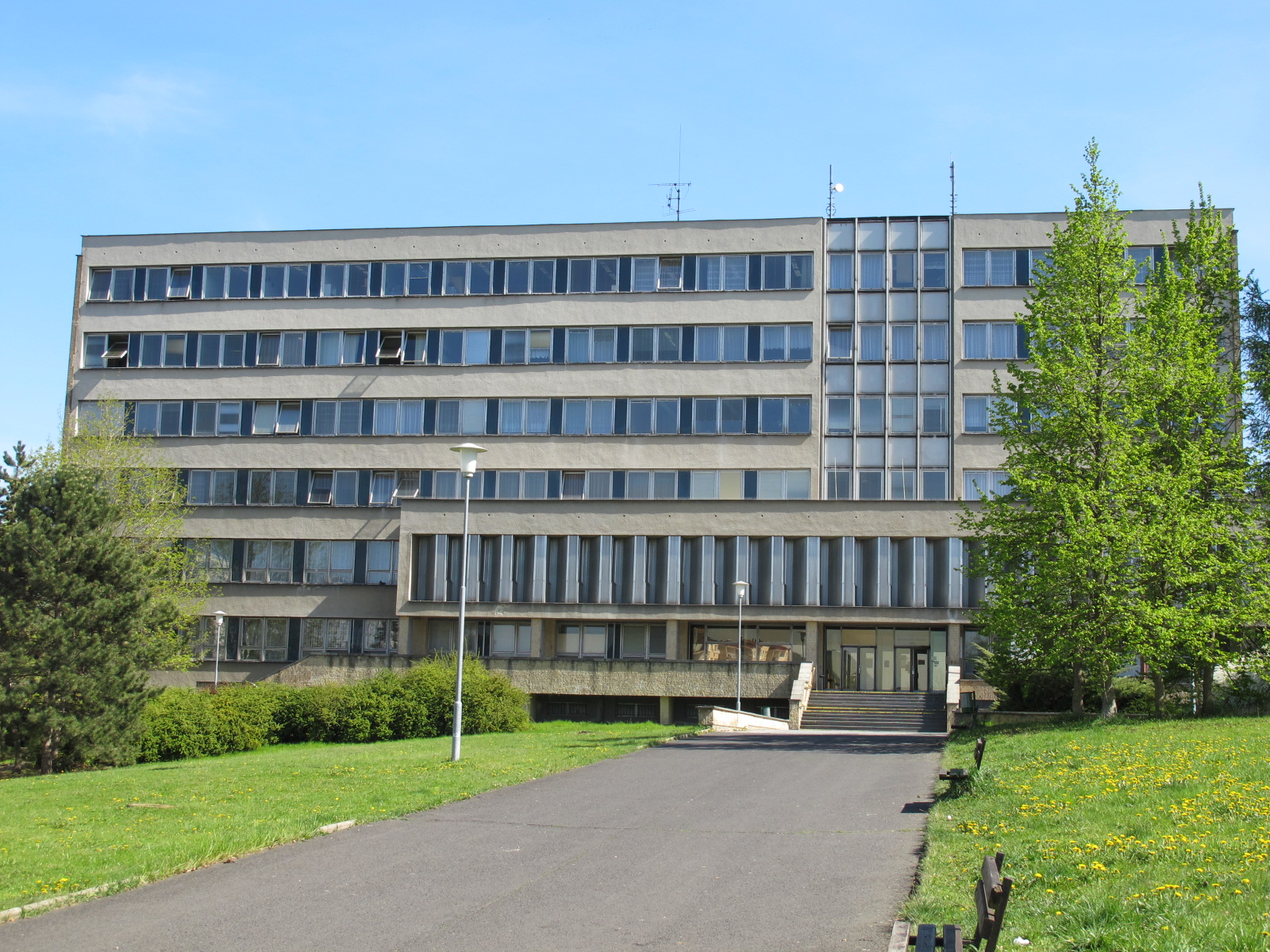 Sídlo Okresního soudu v Mostě